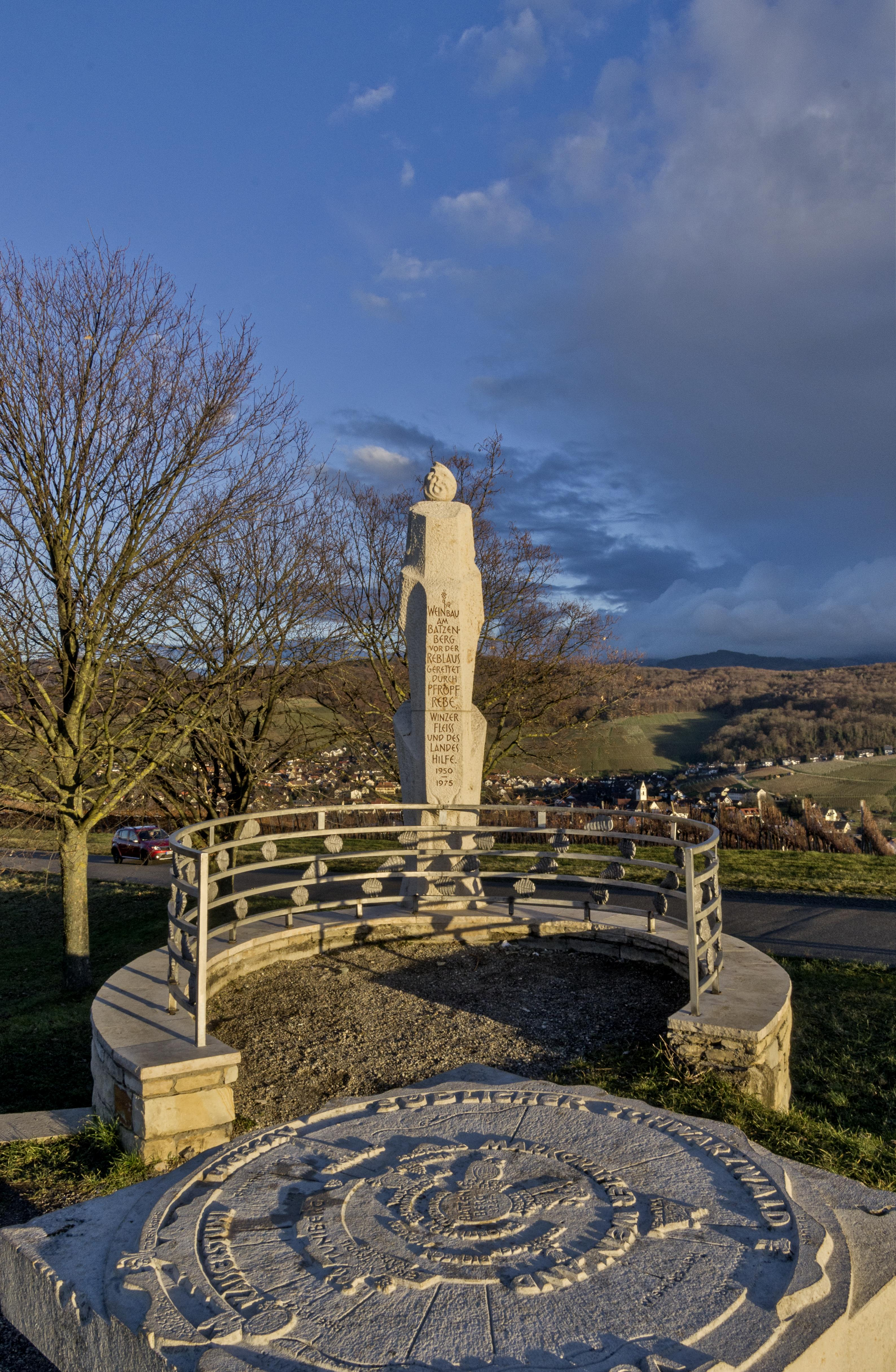 Landschaftsaufnahmen